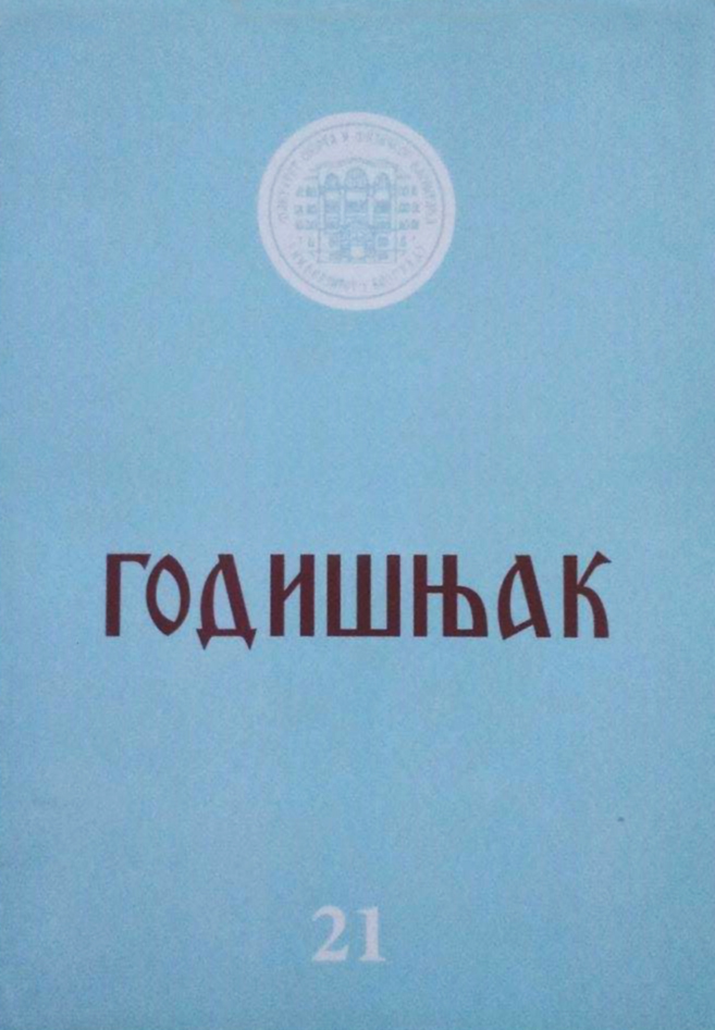 Korica Godišnjak (Fakultet sporta i fizičkog vaspitanja, Beograd), br. 21